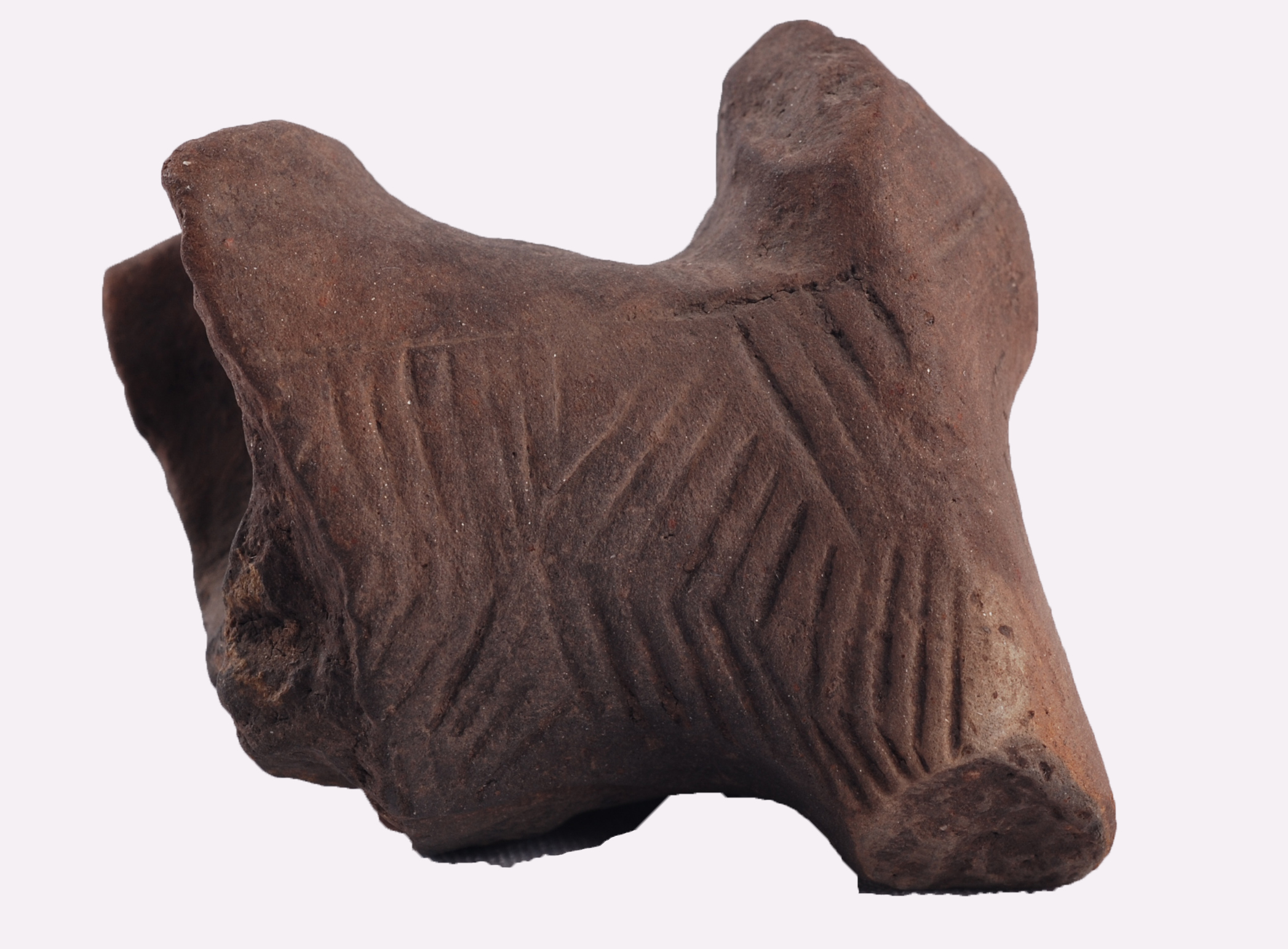 Srpski (latinica): Deo žrtvenika od keramike iz perioda mlađeg neolita (5700-4700. g.p.n.e.). Pronađen je prilikom rekognisciranja na lokalitetu Gradac u Zlokućanu. Deo je praistorijske zbirke Narodnog muzeja u Leskovcu.